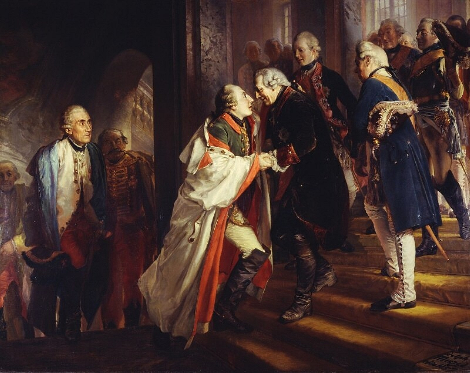 Zusammenkunft Friedrichs II. mit Kaiser Joseph II. von Österreich